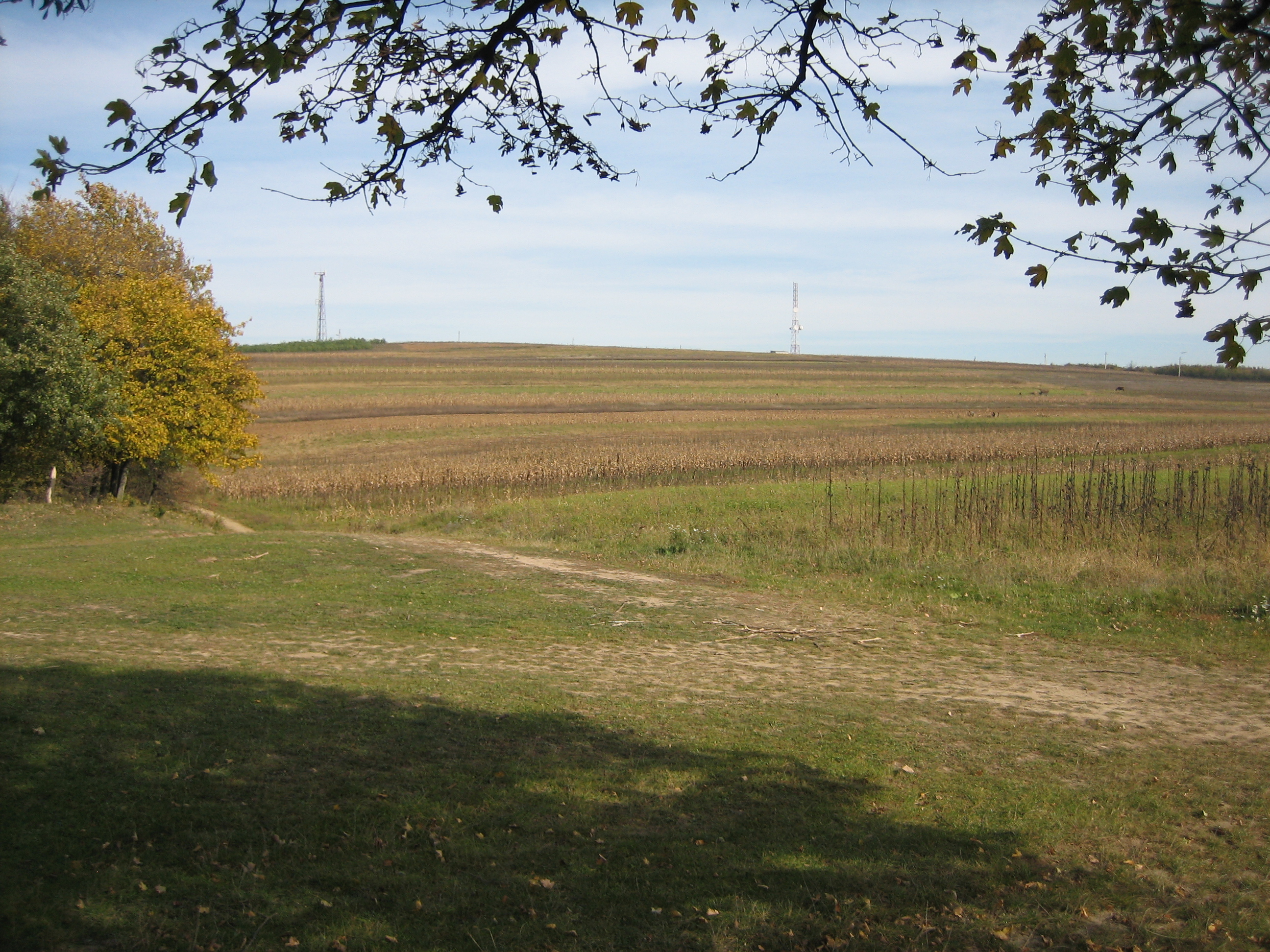 Die höchste Erhebung Moldawiens wird für den Ackerbau und die Kommunikationstechnik genutzt.